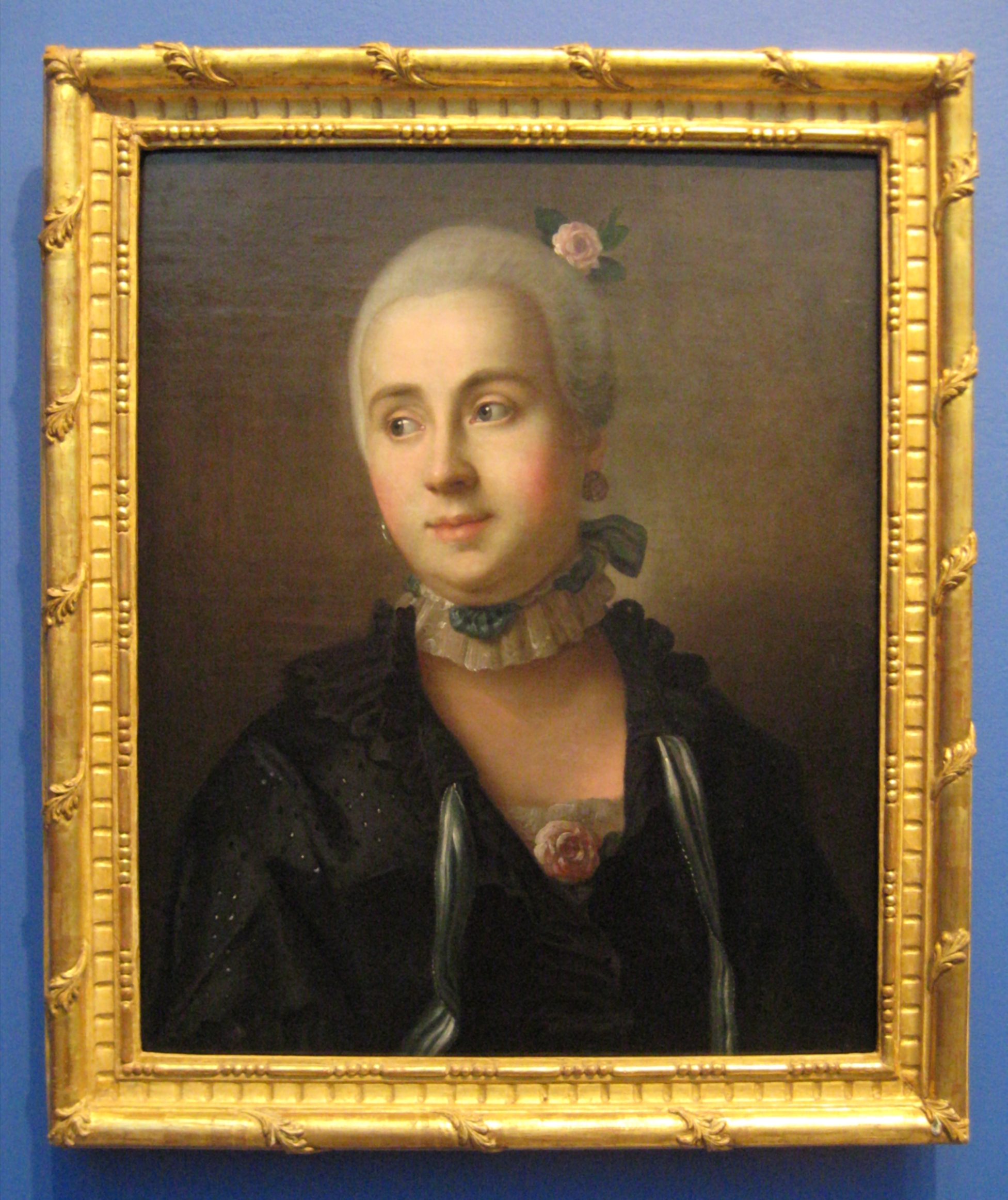 Неизвестный иностранный художник 3-й четверти 18 века. Портрет Анны Карловны Воронцовой. Тип П. Ротари. Музей Кусково